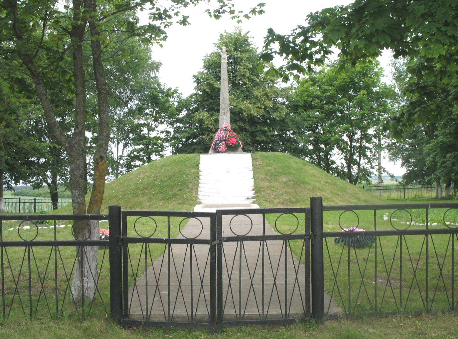 Курган памяти всем жертвам нацистов деревни Греск Слуцкого района. В этот курган подзахоронили кости евреев Греска из карьера в урочище Гаек, где их расстреляли в 1941 году.